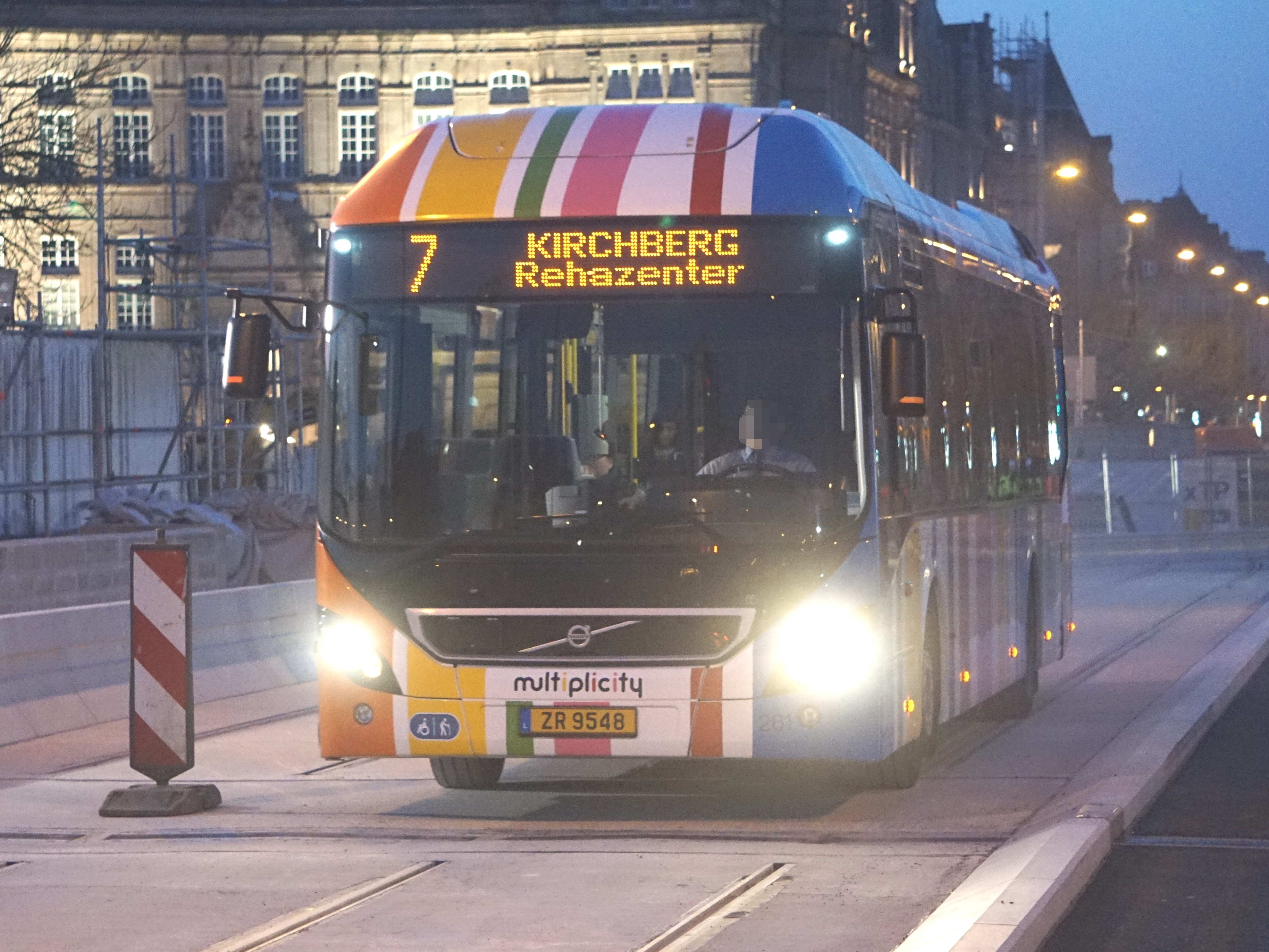 Lëtzebuerg, AVL Bus 261, Linn 7 op der Neier Bréck a Richtung Kierchbierg